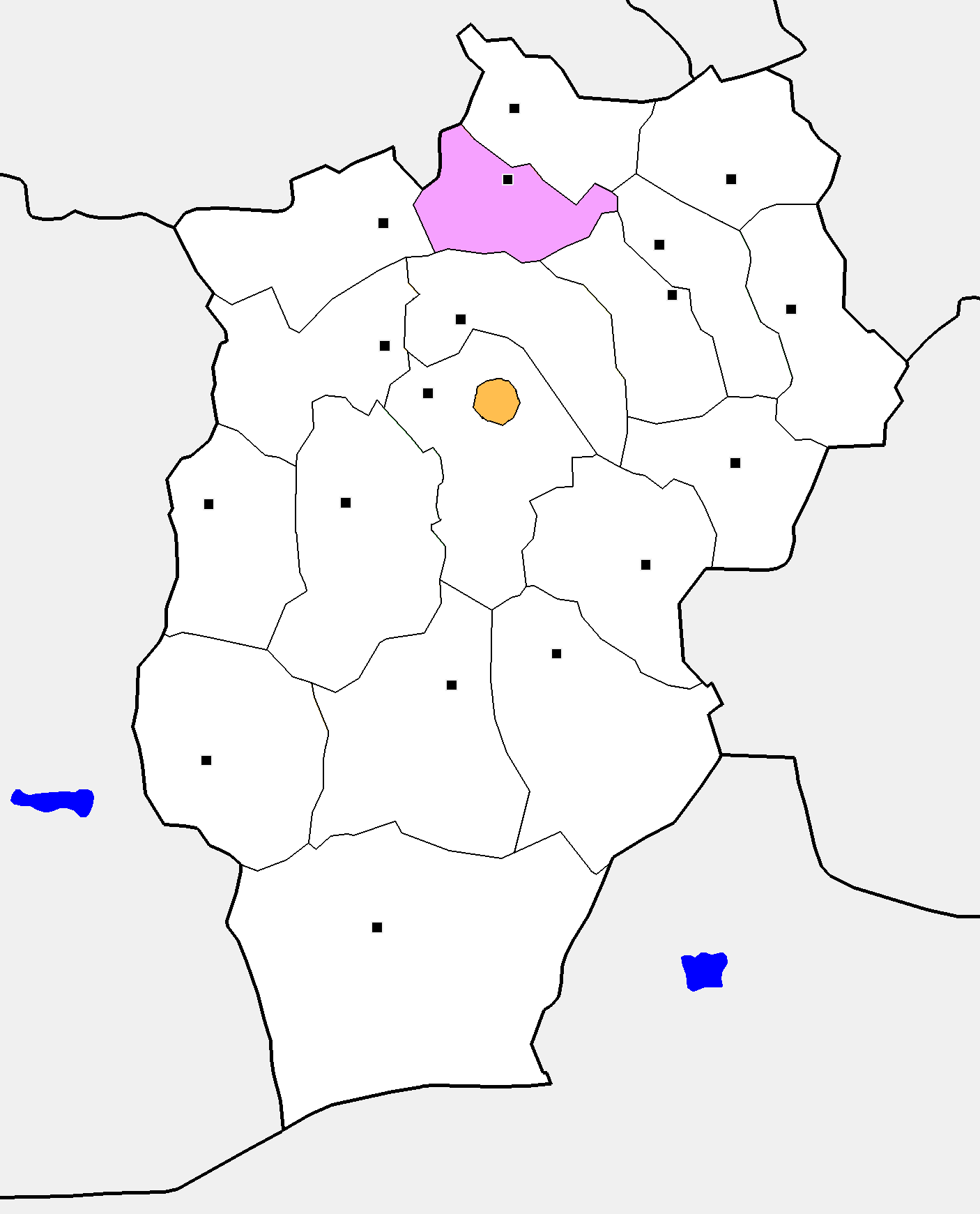 Монгол: Өвөрхангай аймгийн Хужирт сумын байршил